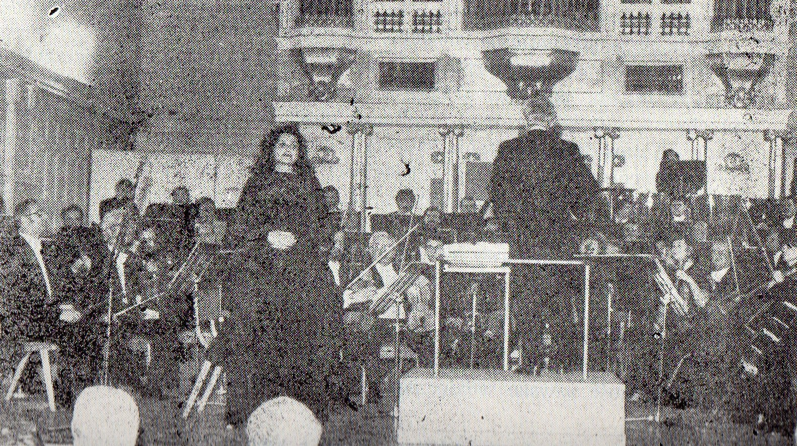 200. Koncert Poznański - 26.11.1983r. Ewa Werka.